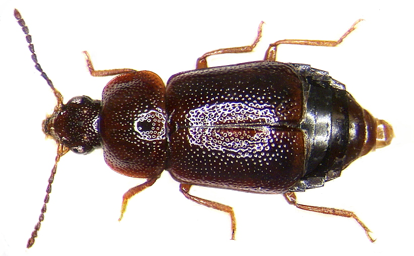 Familie: Staphylinidae Grösse: 5-6 mm Verbreitung: Europa Ökologie: in Flußauen Fundort: Germania, Schwarzwald, Mulden, 1000 m leg.det. U.Schmidt, 1981 Foto: U.Schmidt, 2005